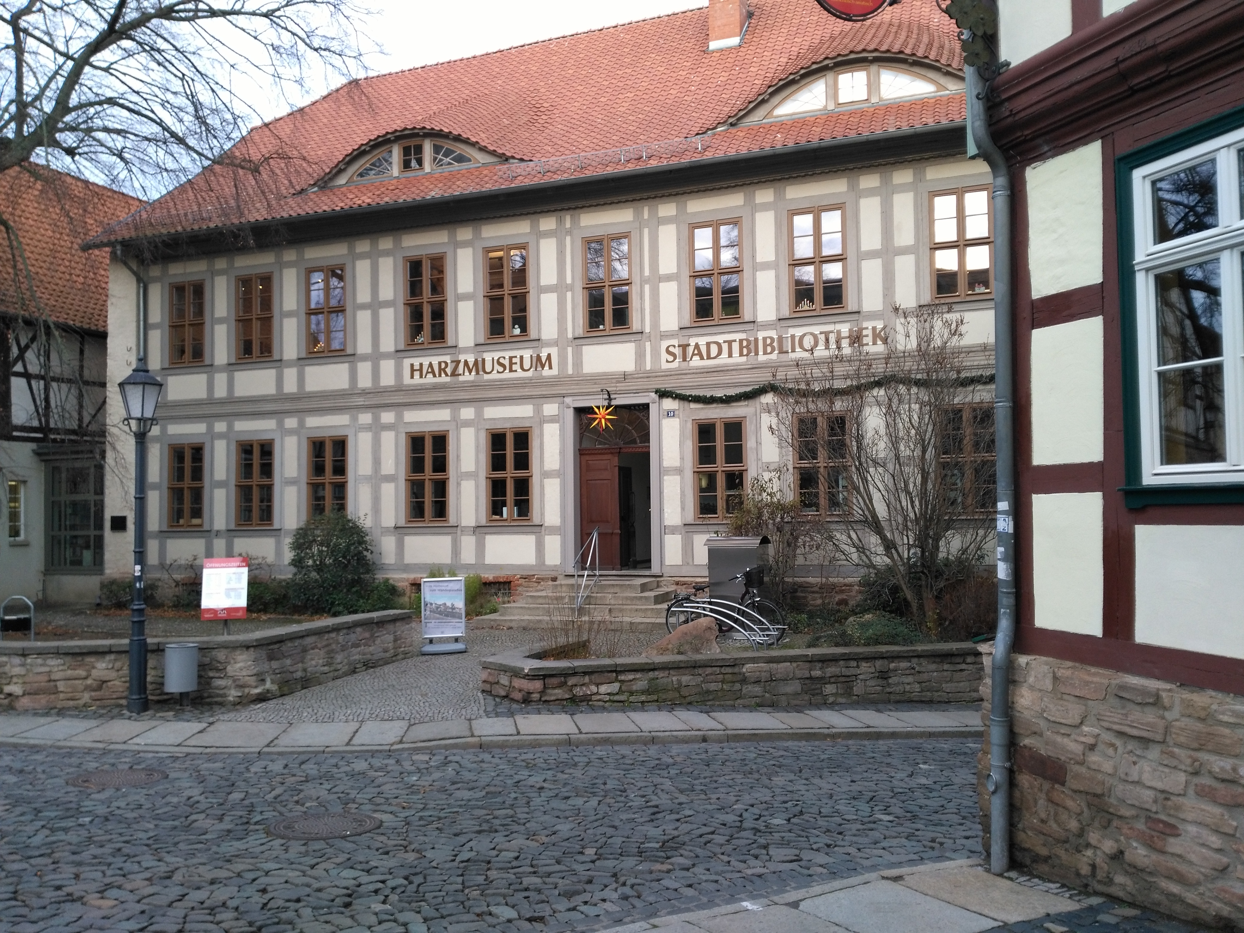 Harzmuseum und Stadtbibliothek Wernigerode mit neuem Schriftzug (Dezember 2019)